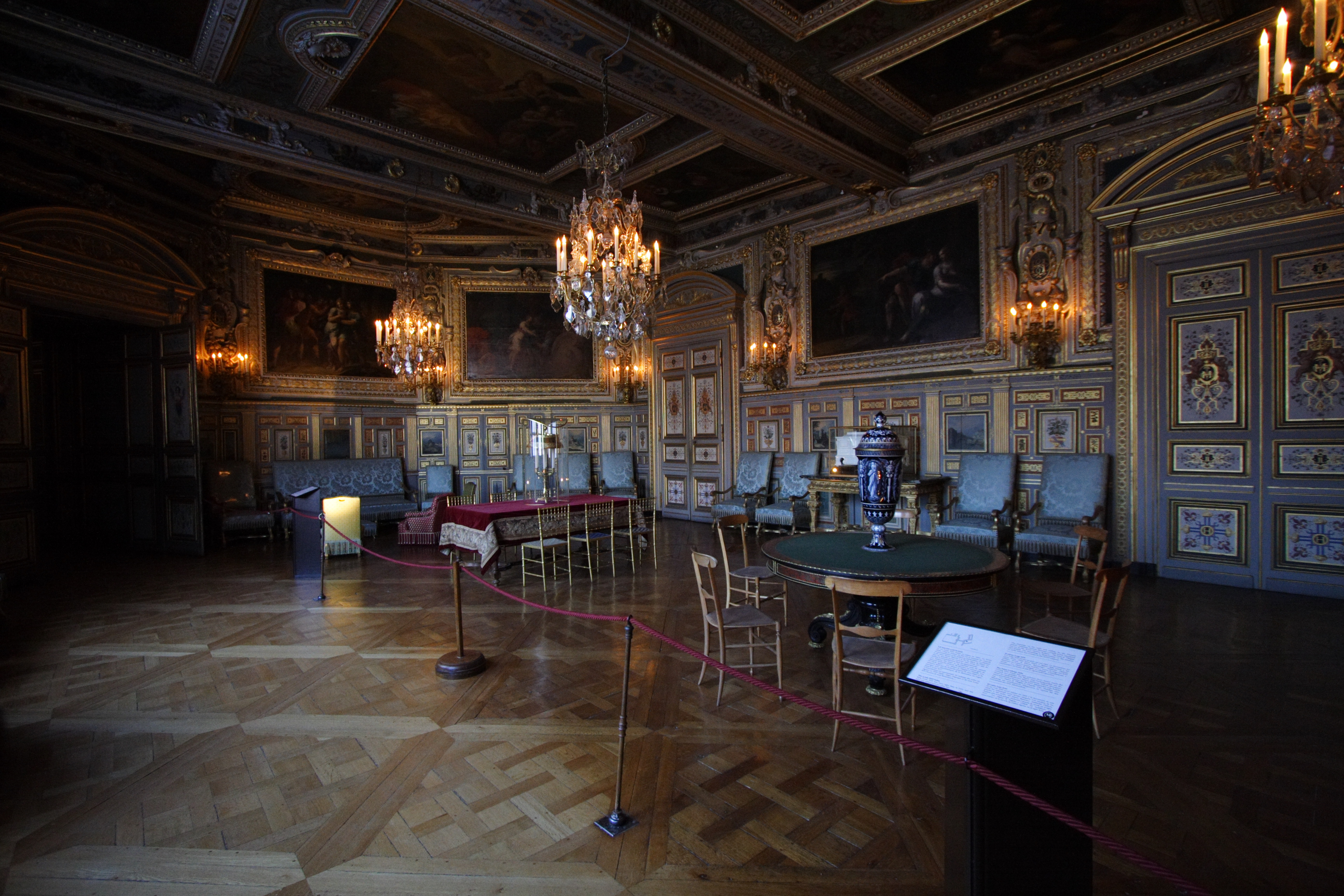 Salon Ludwigs XIII., auch "ovales Zimmer" genannt, im Schloss Fontainebleau